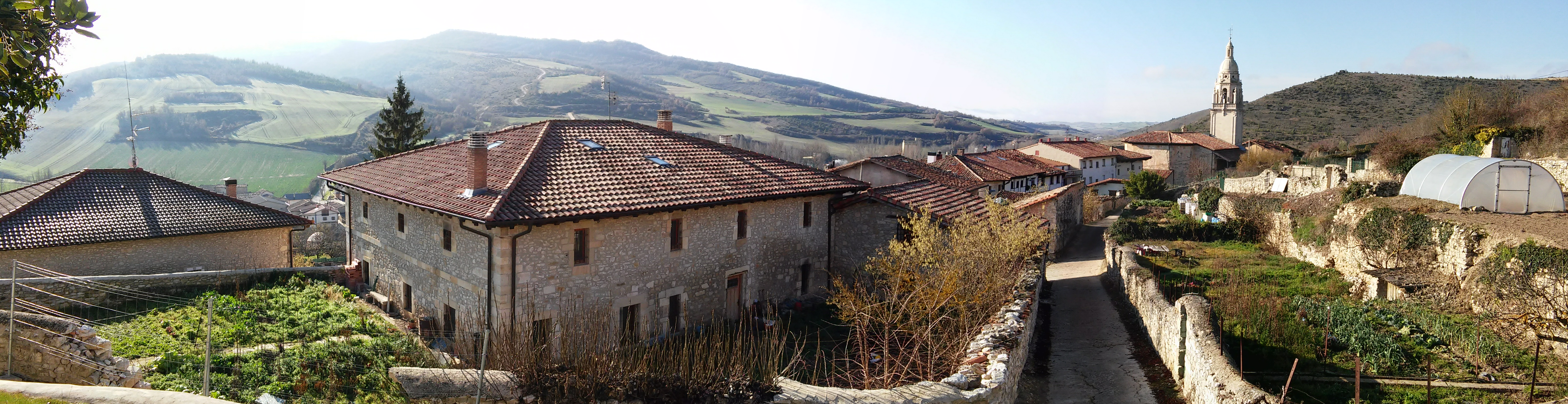 Trebiñu herria San Joan baselizatik